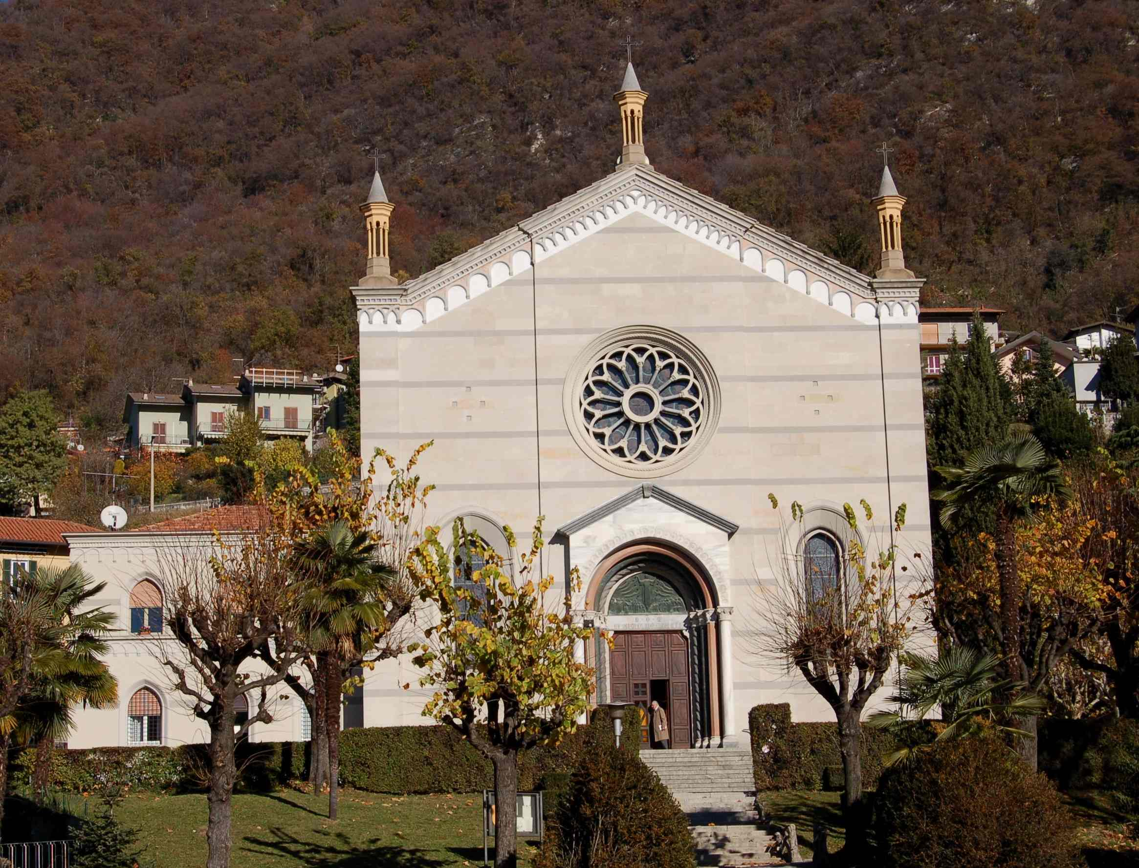 Celso Mosca,chiesa di Maslianico